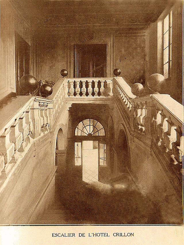 Intérieur de l'Hôtel des ducs de Crillon